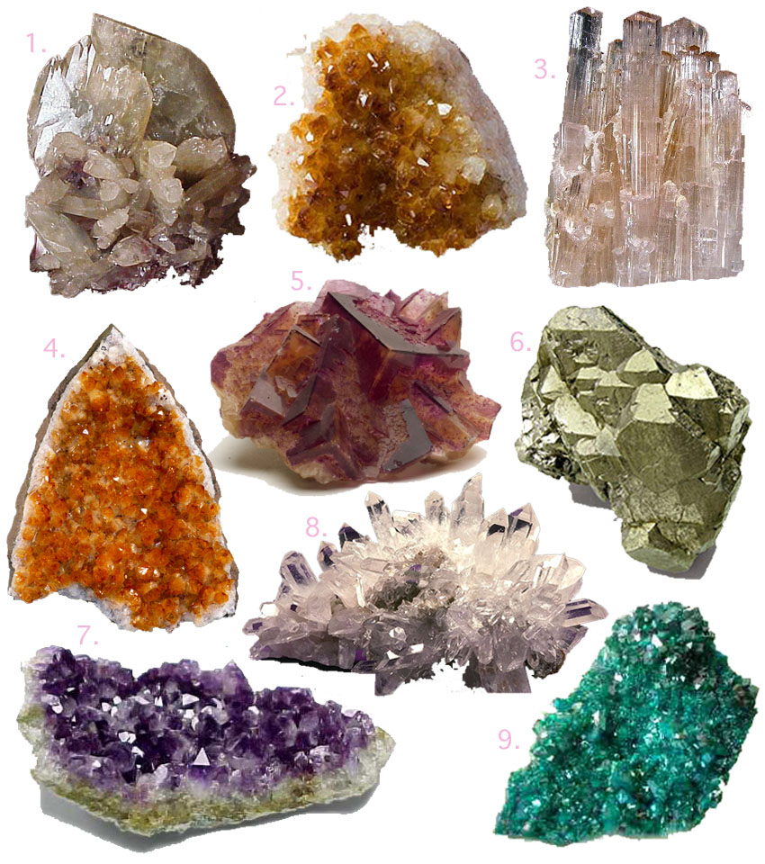 Минералы горных пород